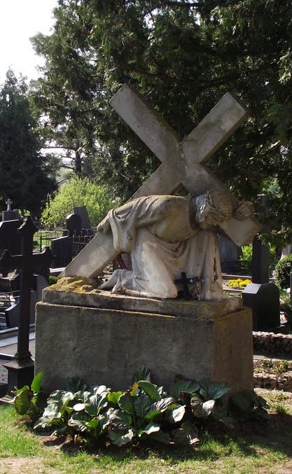 Kristaus figūra centrinėje Krūvandų kapinių vietoje